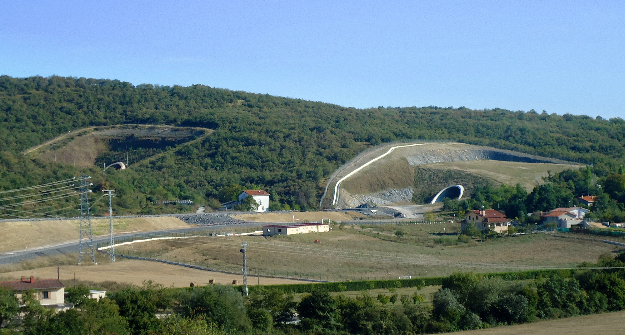 Abiadura Handiko Trenaren lanak Urbinan